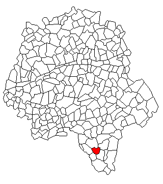 Localisation de Chaumussay en Indre et Loire